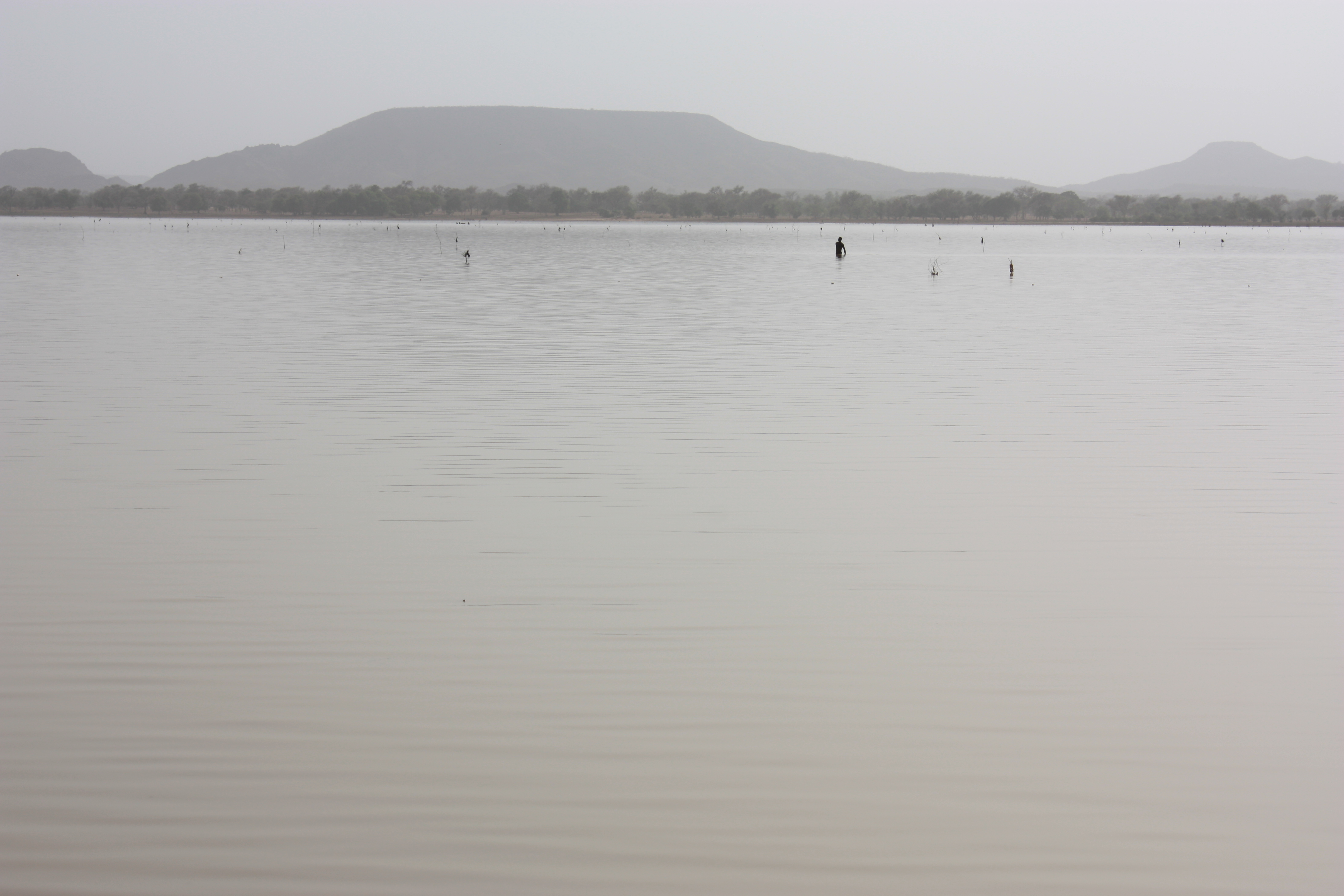 Lac de Dem, Burkina Faso